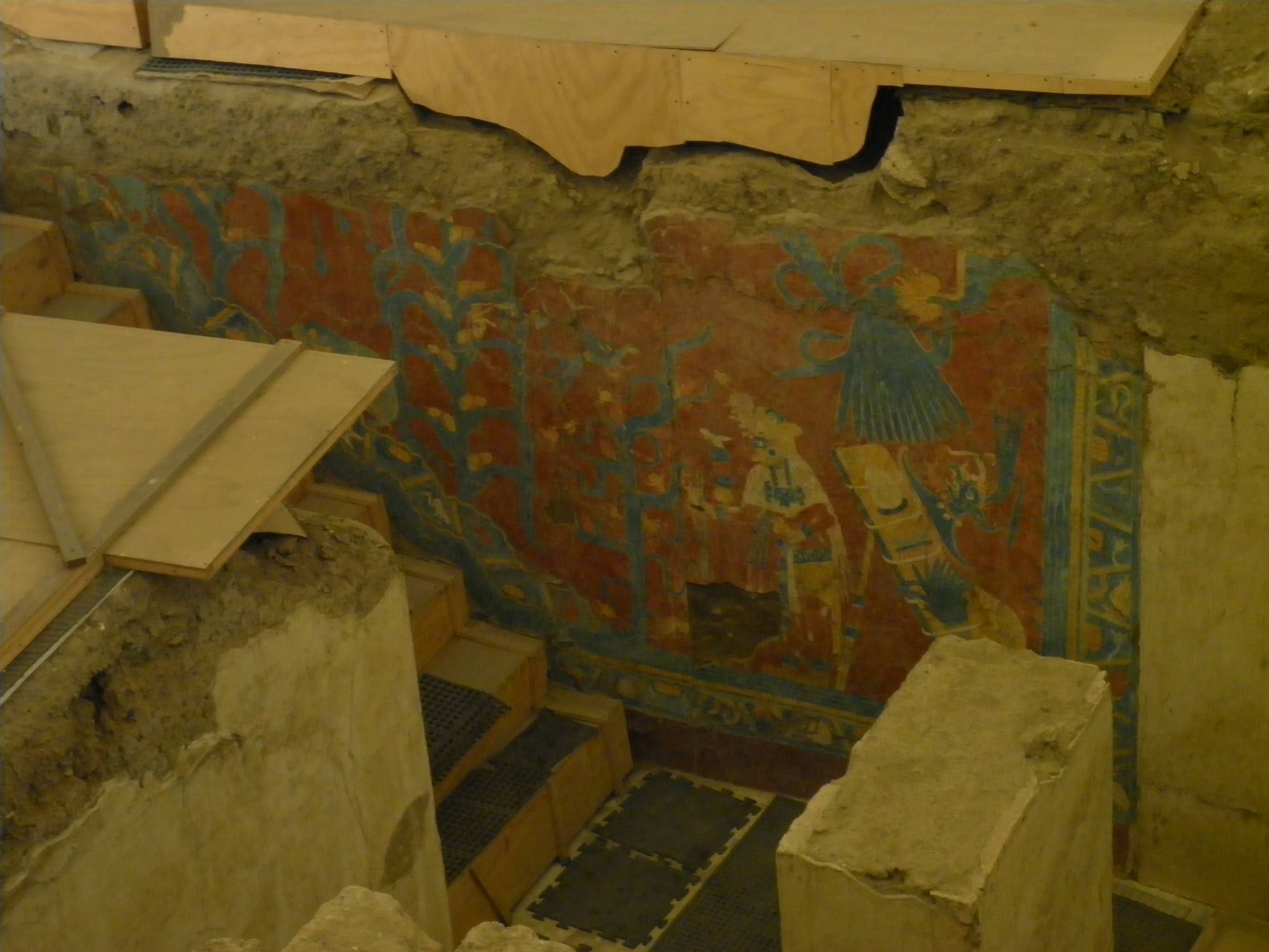 mural